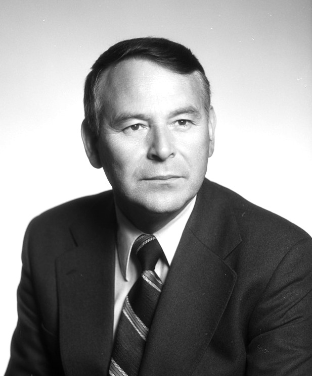 Ingvald Ulveseth, portrett, mann, politiker, fylkesmann, statsråd, brystbilde.